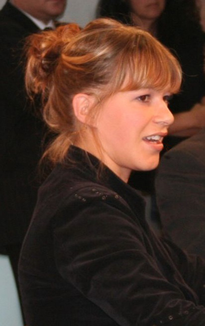 Franka Potente, from